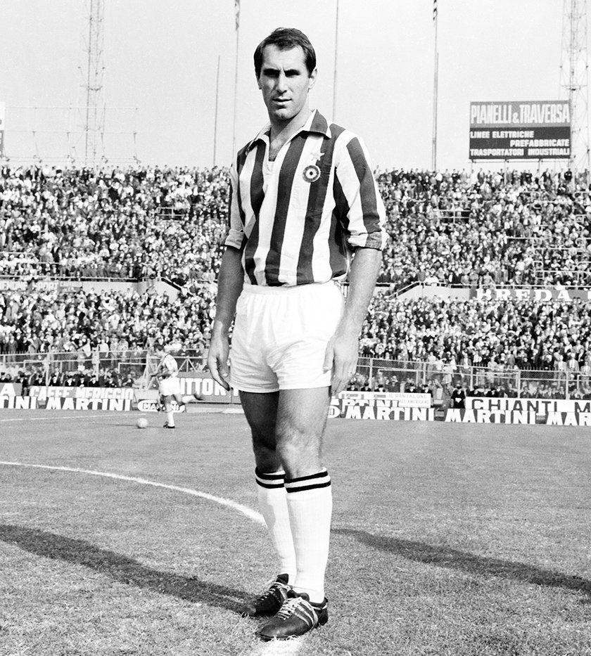 Il calciatore italiano Giancarlo Bercellino alla Juventus nella stagione 1965-66, in posa prima di una partita allo stadio Comunale di Torino.